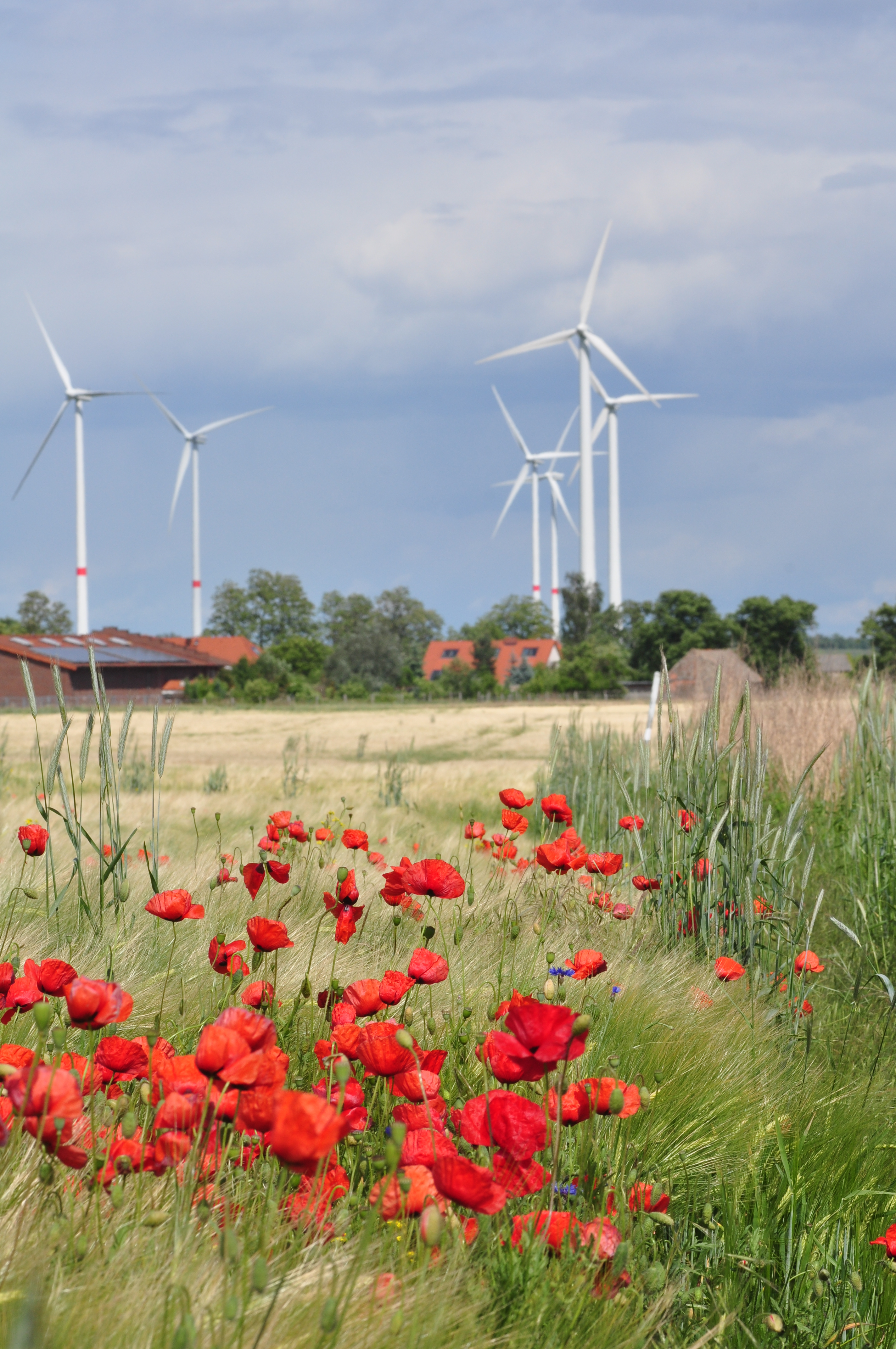 Windräder vor Mohnblumen in Märkisch-Oderland (Wegendorf)